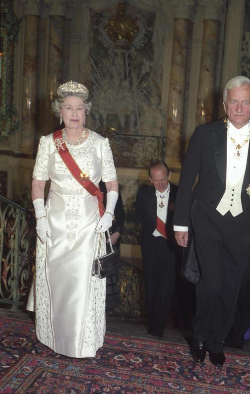 Besuch von Königin Elisabeth II.. S.M. Elisabeth II. und Prinzgemahl Phillip.